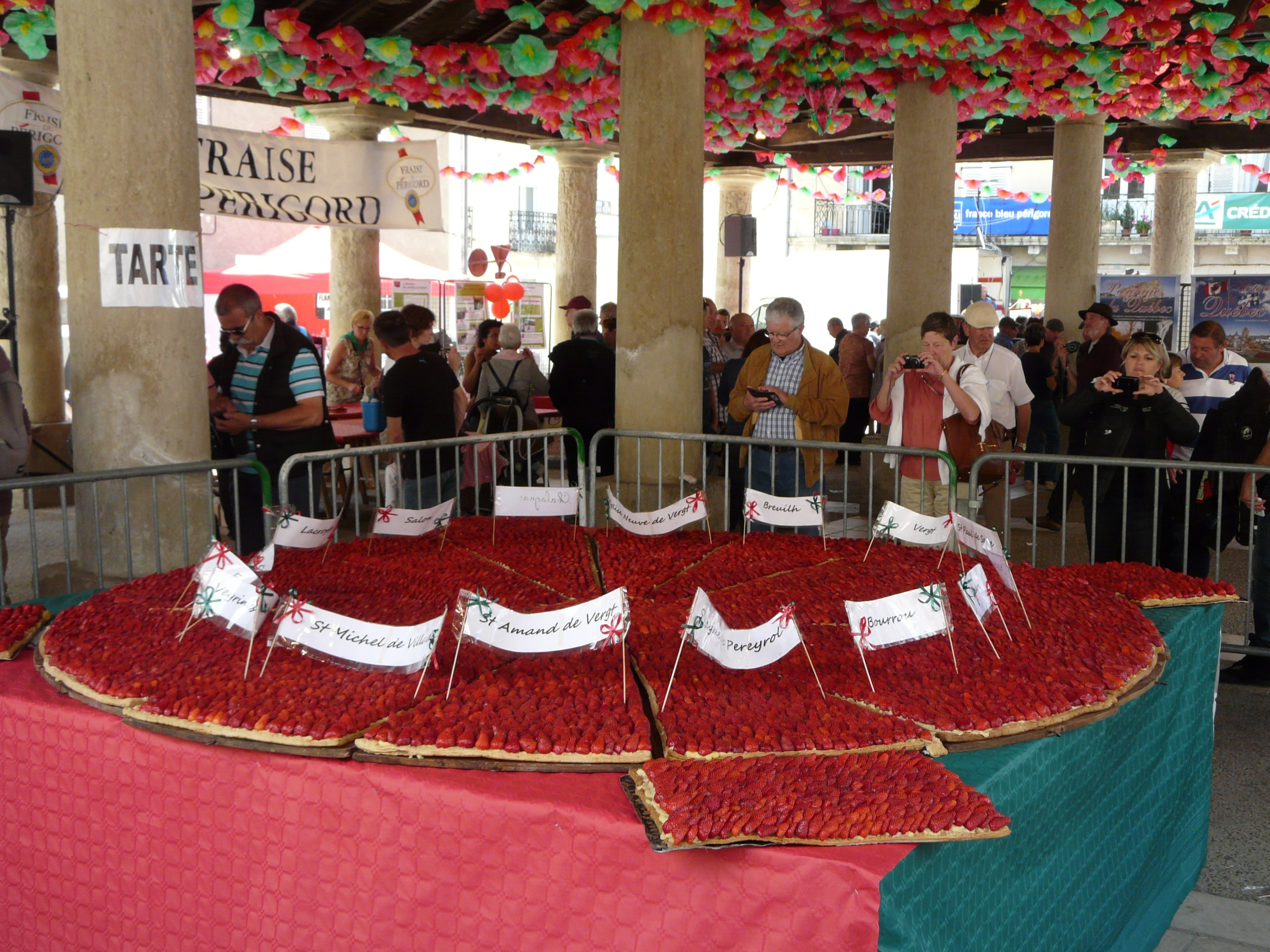 La « tarte aux fraises » géante de Vergt, Dordogne, France.